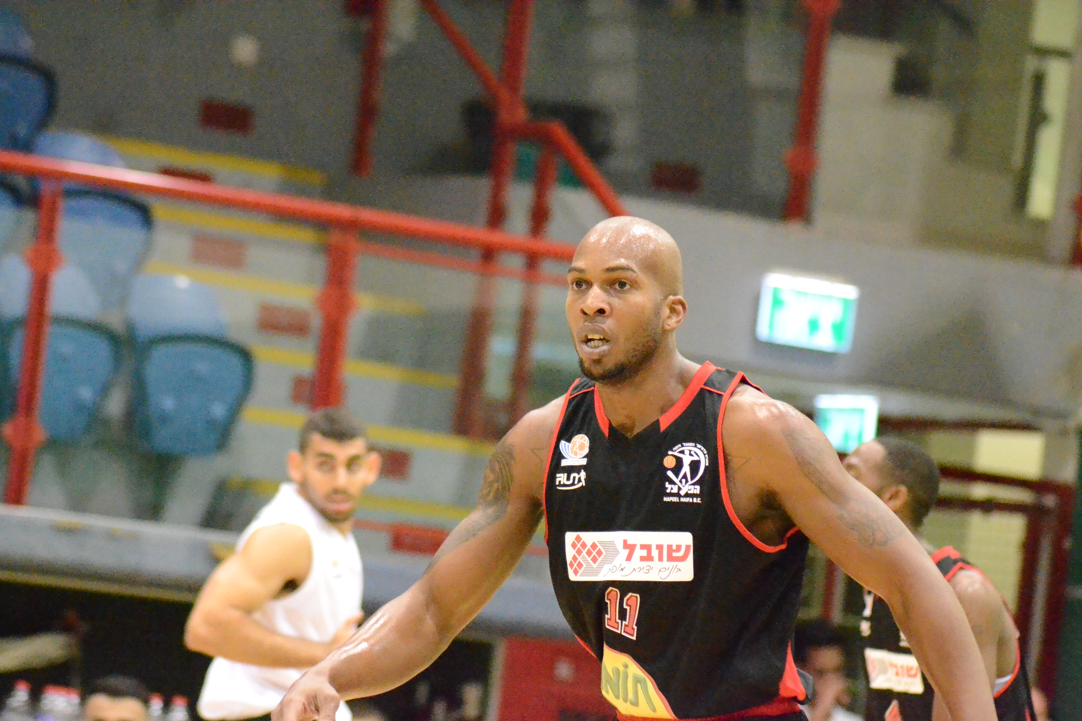 רומרו במהלך משחק בליגה הלאומית 2017